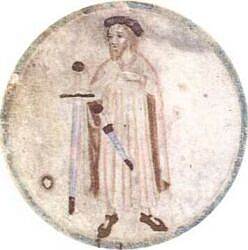 Guifré el Pilós